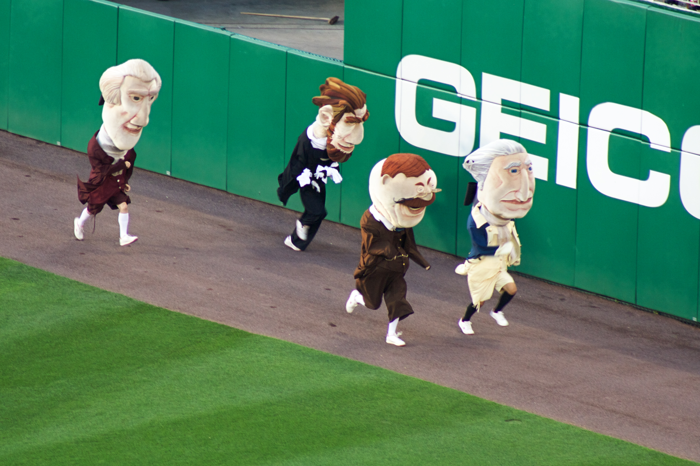 Presidents Racing